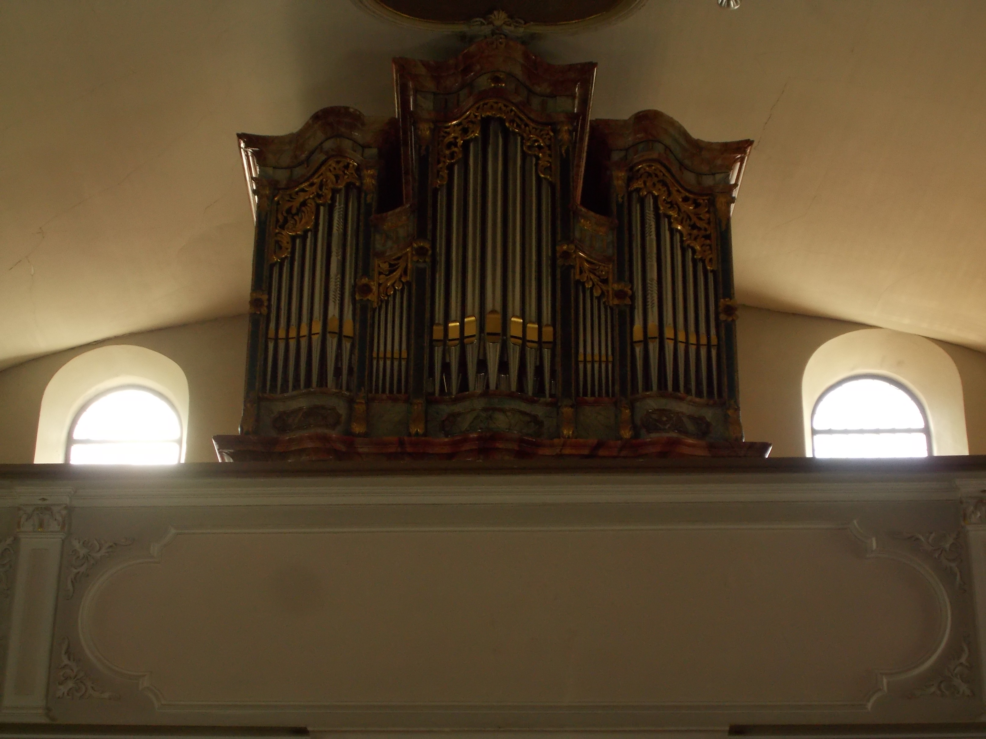 Blick auf die Orgel